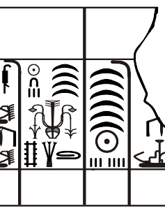 Ausschnitt aus der Inschrift des Palermosteins, dargestellt ist das Krönungsjahr von König Djer (1. Dynastie) / Detail from the inscription of the Palermo stone, showing the year of coronation of king Djer (1st dynasty of Egypt).